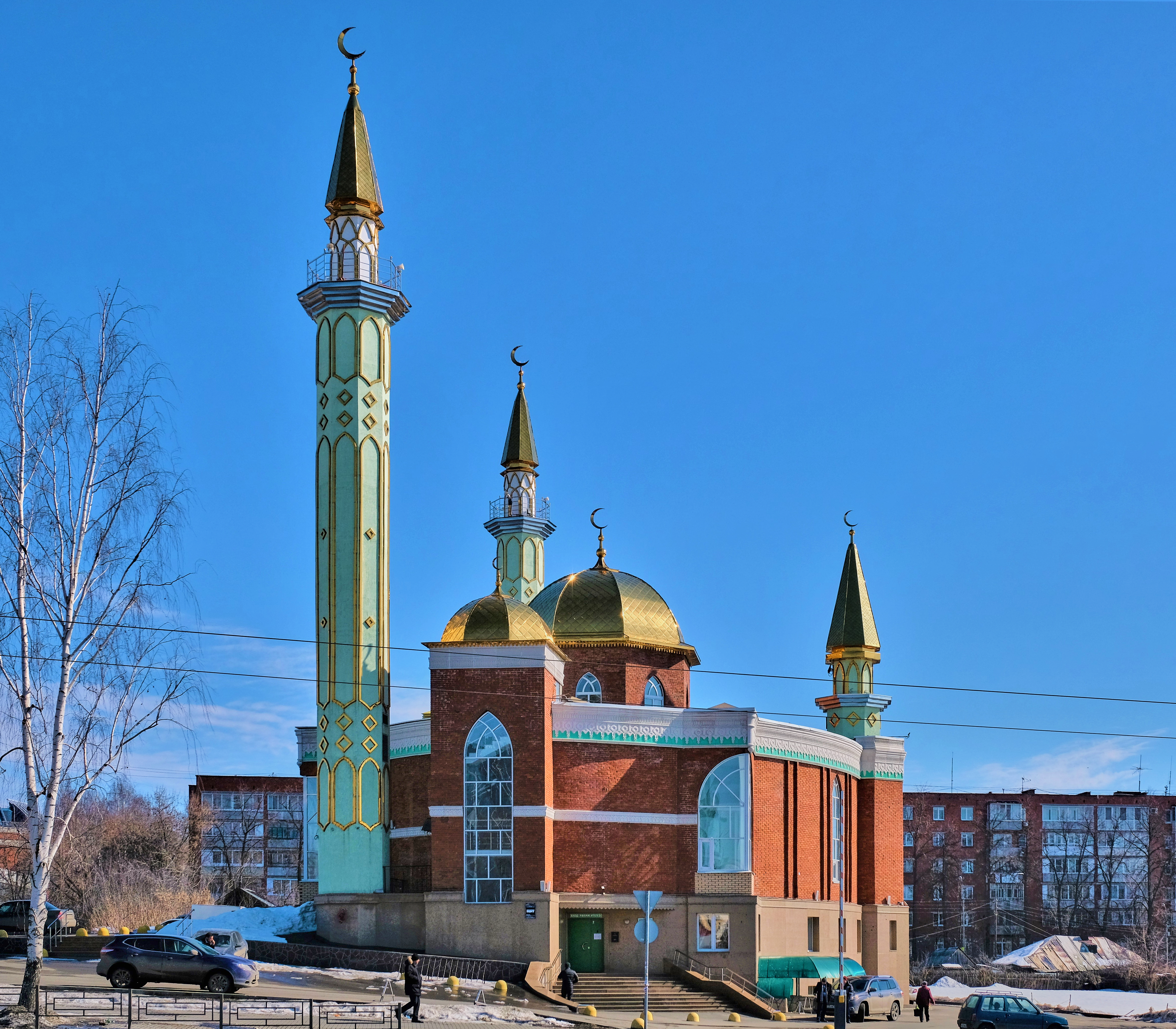 Центральная мечеть в Ижевске